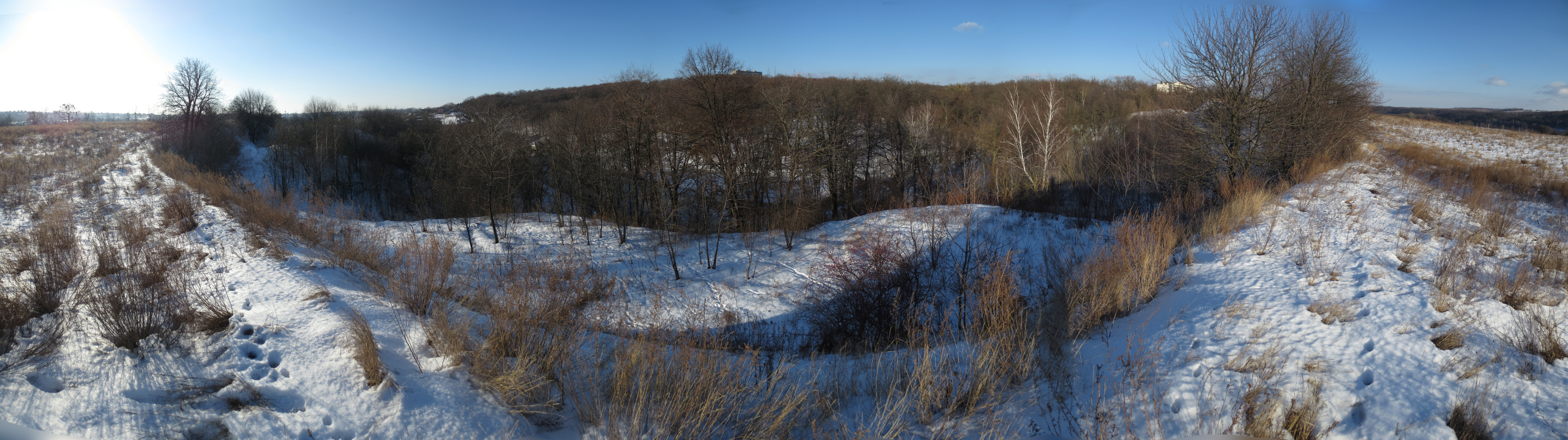 Хотівське городище, панорама західного краю. Під крутим ескарпованим схилом видно нерівну терасу, що в центрі знімку утворює розширення. По центру - північно-західний напрямок.